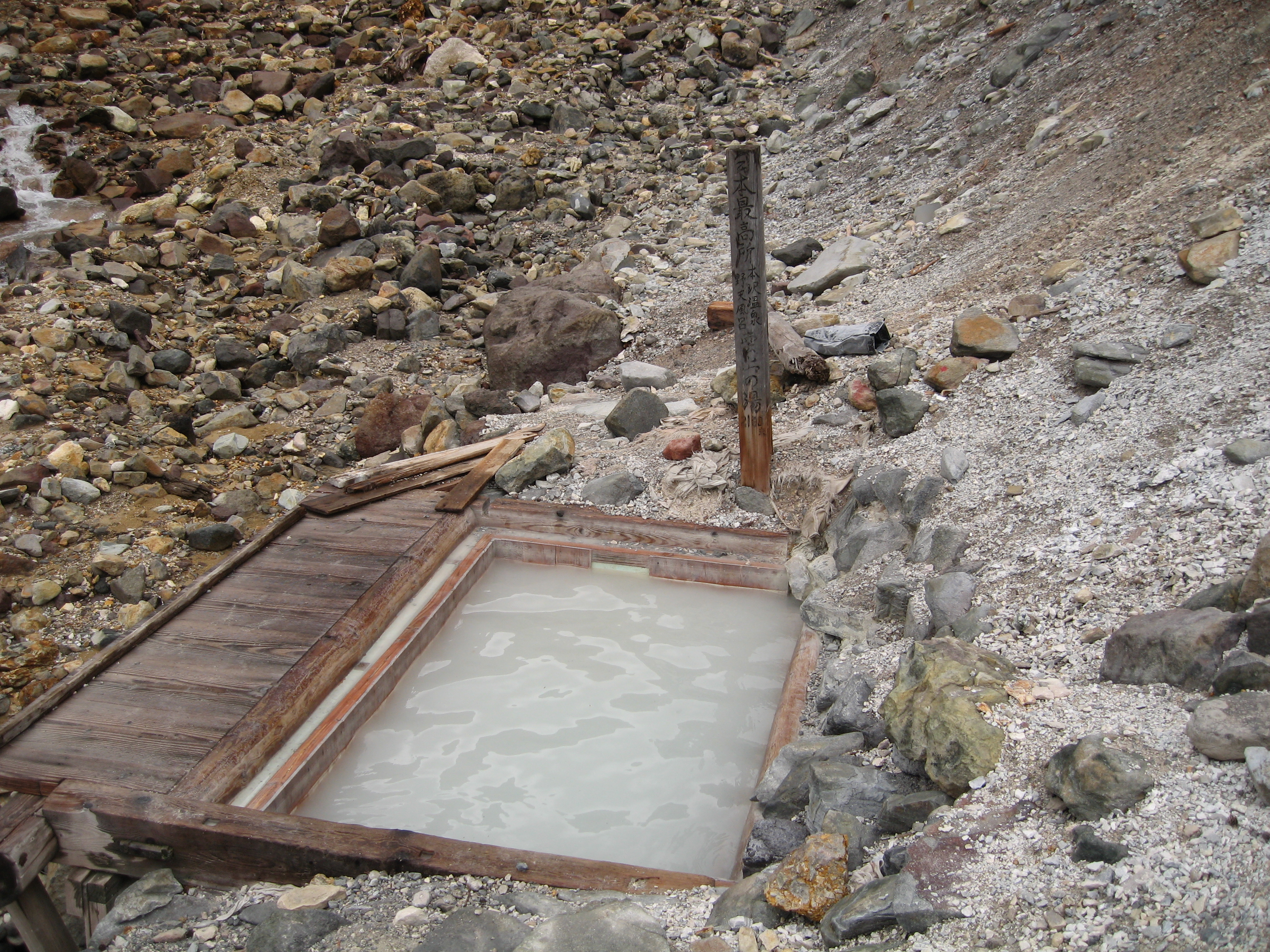 本沢温泉露天風呂